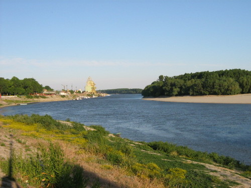 Donaus sidearm Borcea.